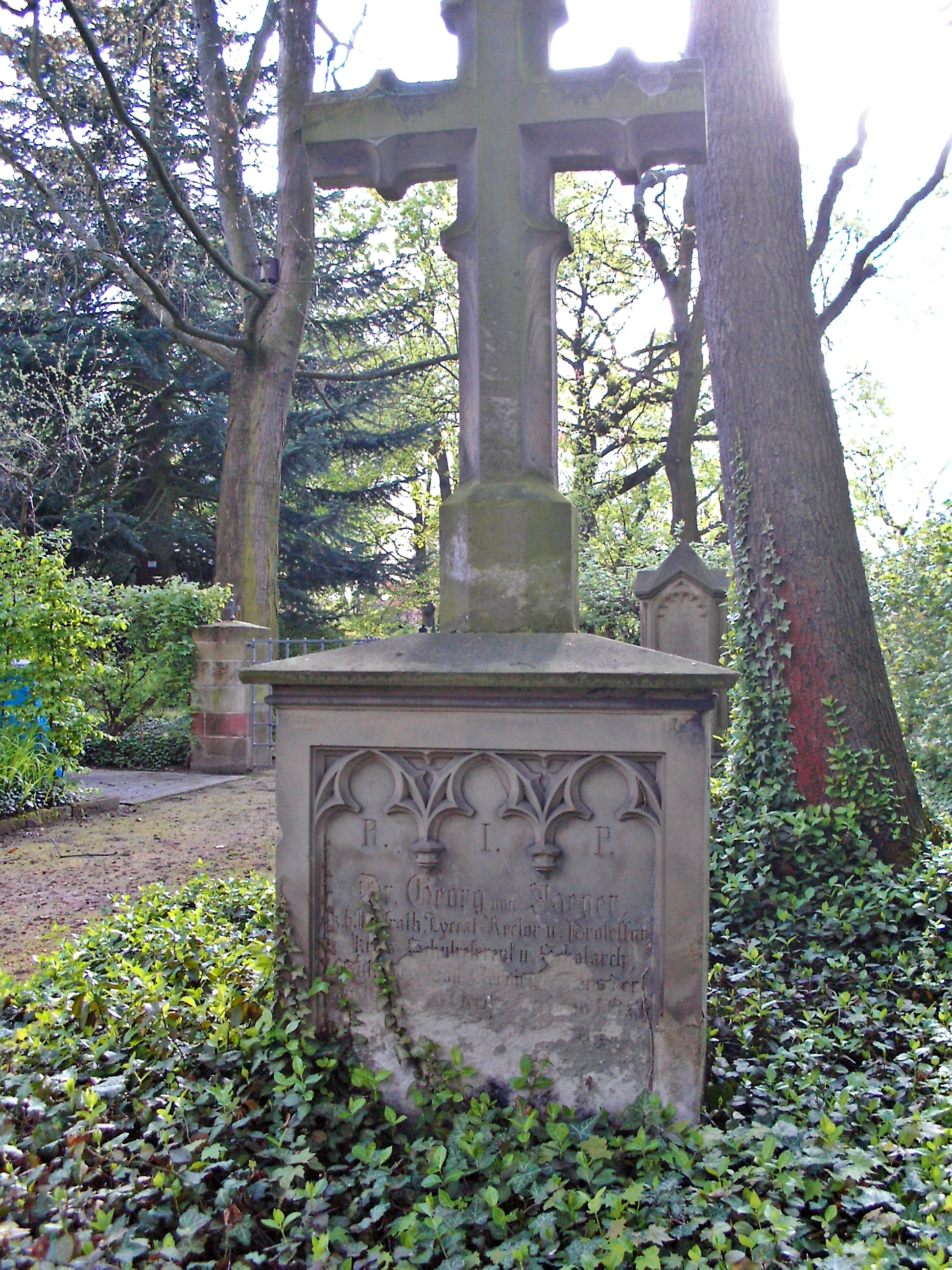 Georg von Jäger (1778-1863), Bayerischer Pädagoge, Grabstein, Alter Friedhof Speyer